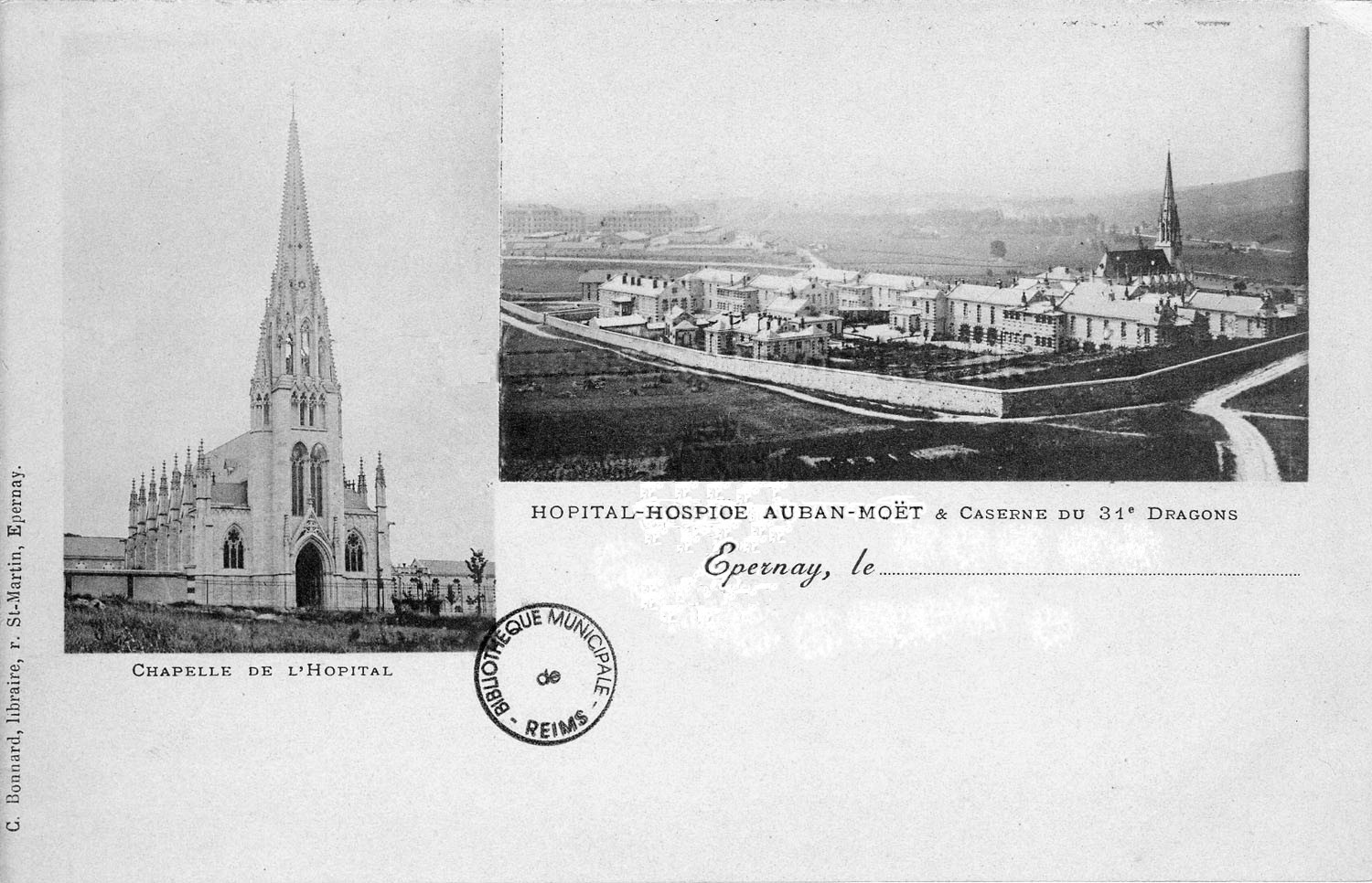 sur une vue ancienne.